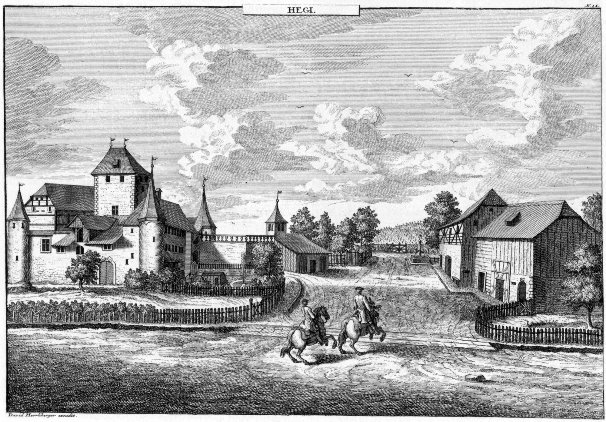 Das Landvogteischloss Hegi (Winterthur-Hegi) der Stadt Zürich. Stich von David Herrliberger, ca. 1740